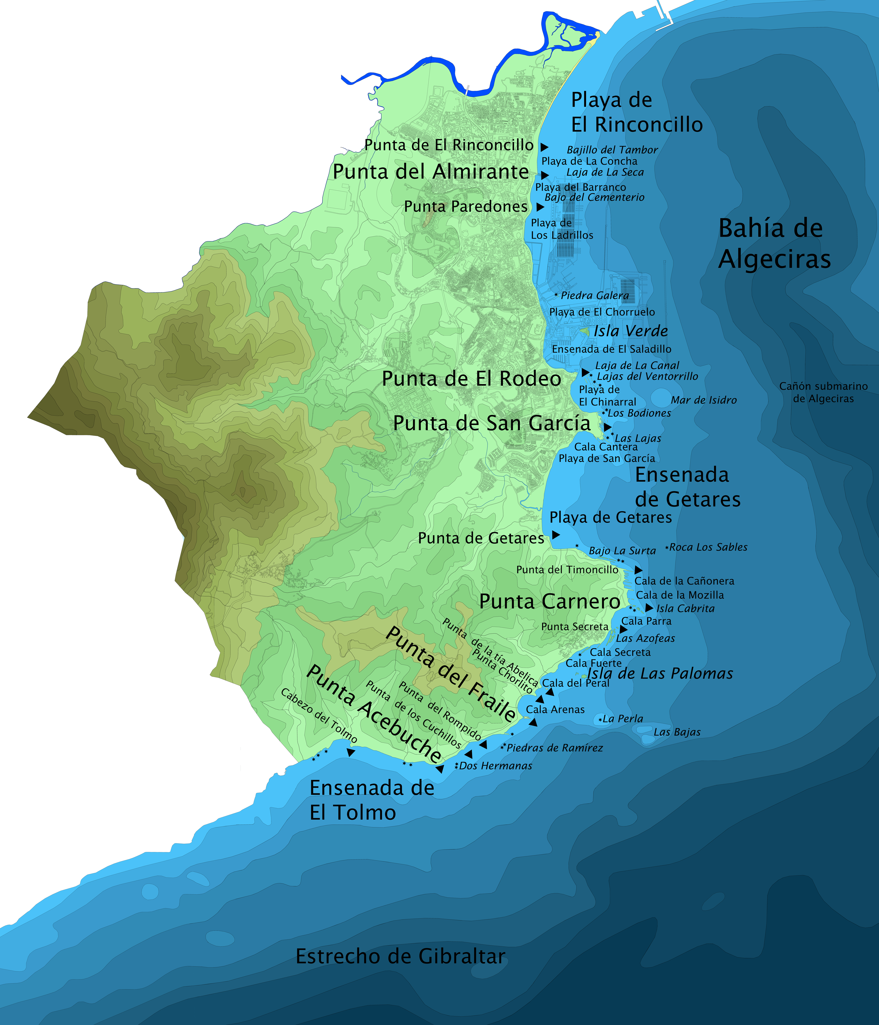 Mapa del término municipal de Algeciras indicando sus accidentes costeros. Algeciras, Andalucía, España.